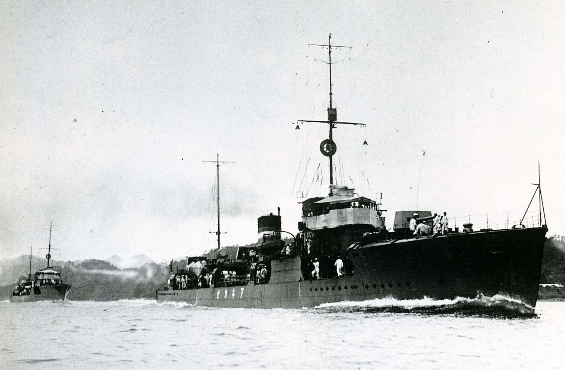 Imperial Japanese Navy destroyer Akikaze departing Yokosuka.